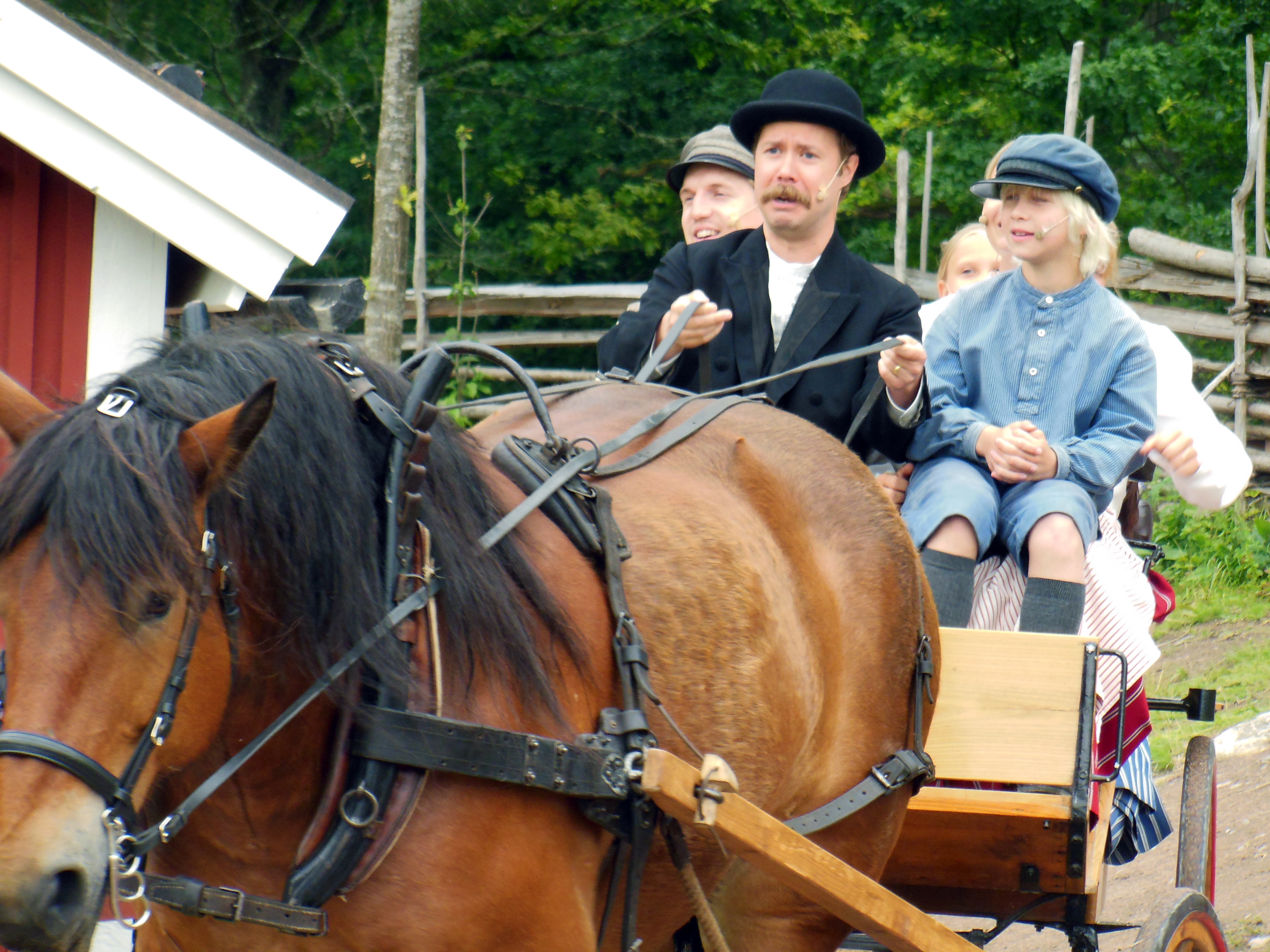 Anton och Emil på Astrid Lindgrens Värld i Vimmerby, 2014.